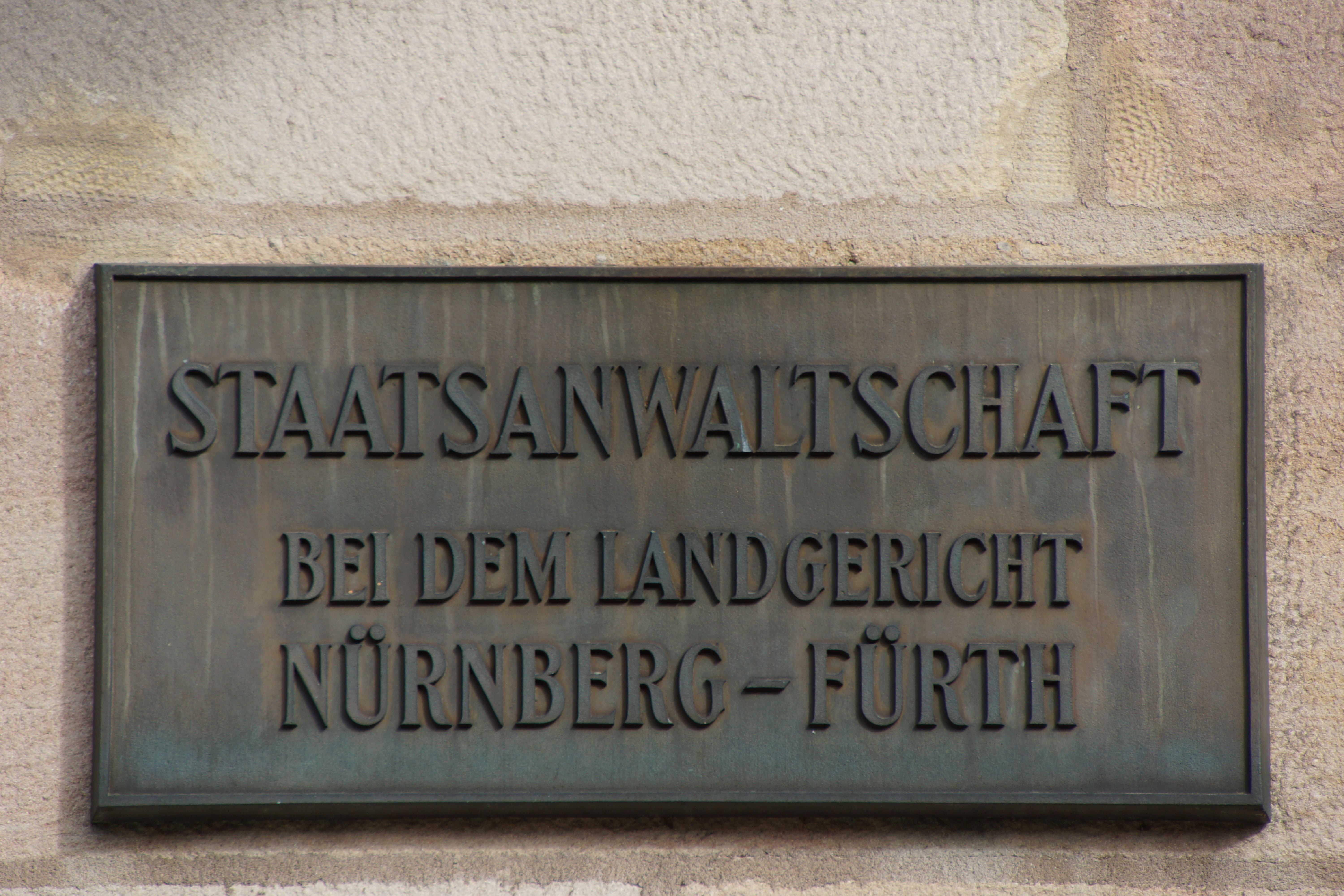 Der Justizpalast in der Fürther Straße in Nürnberg